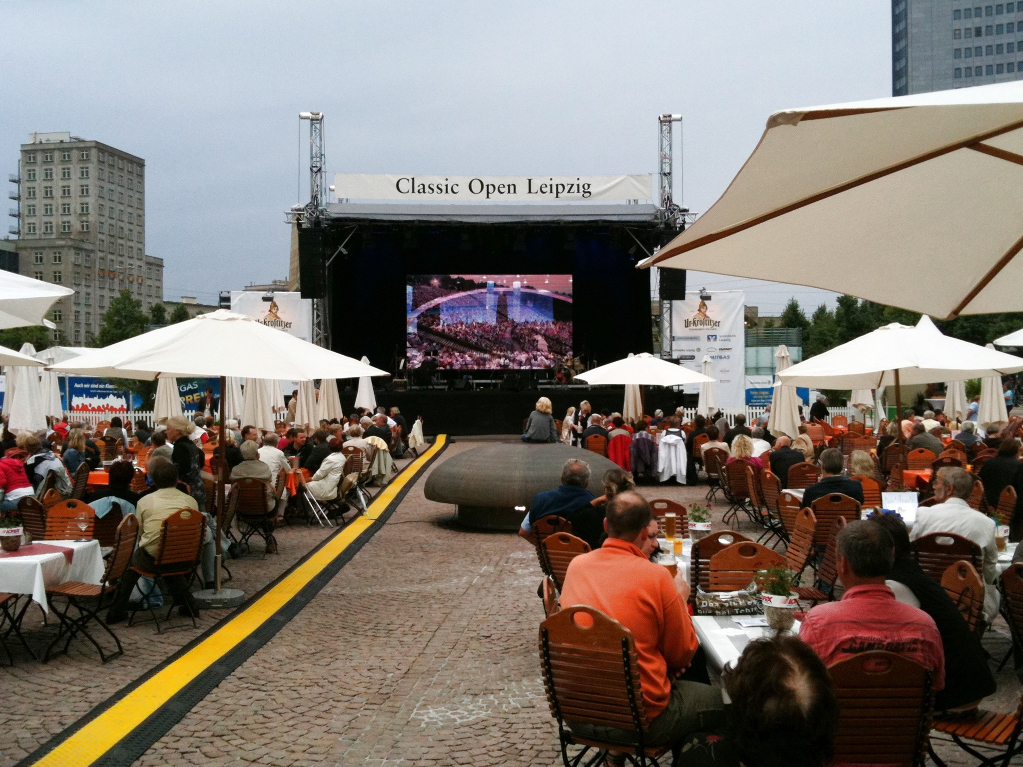 Deutschland, Leipzig: Classic Open auf dem Augustusplatz. Live-Konzerte und Konzertaufzeichnungen werden auf diesem mehrtätigen Festival unter freiem Himmel dargeboten.